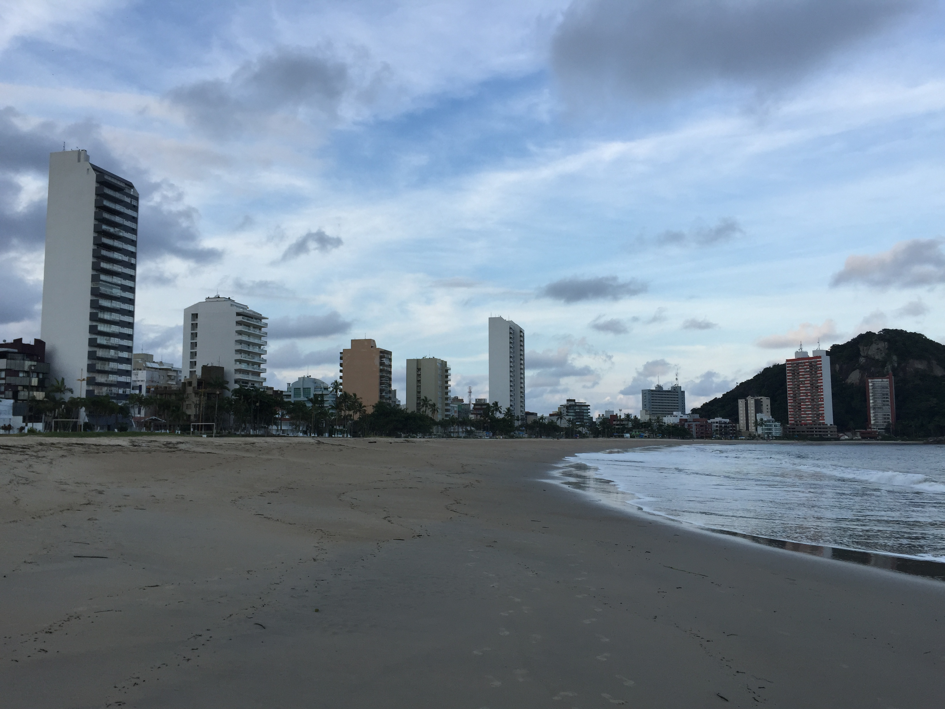 Orla da Praia de Caiobá, Matinhos Cultural propertyPaisagem da Orla Marítima de Matinhos, Matinhos, Paraná, Brazil Q65969393, P727: iPatrimônio ID: matinhos-paisagem-da-orla-maritima-de-matinhos